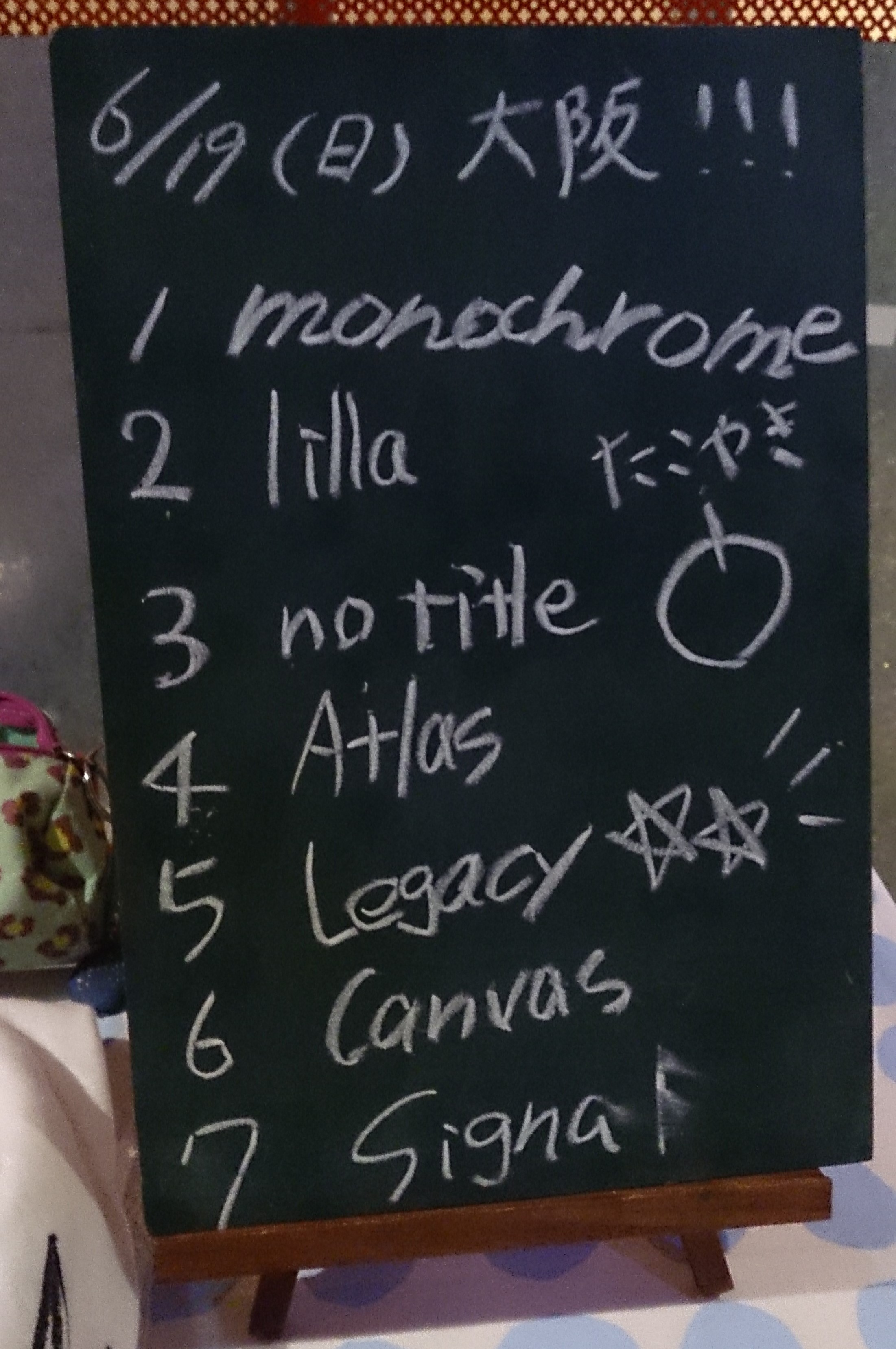 amiinAセトリボード(20160619(1))